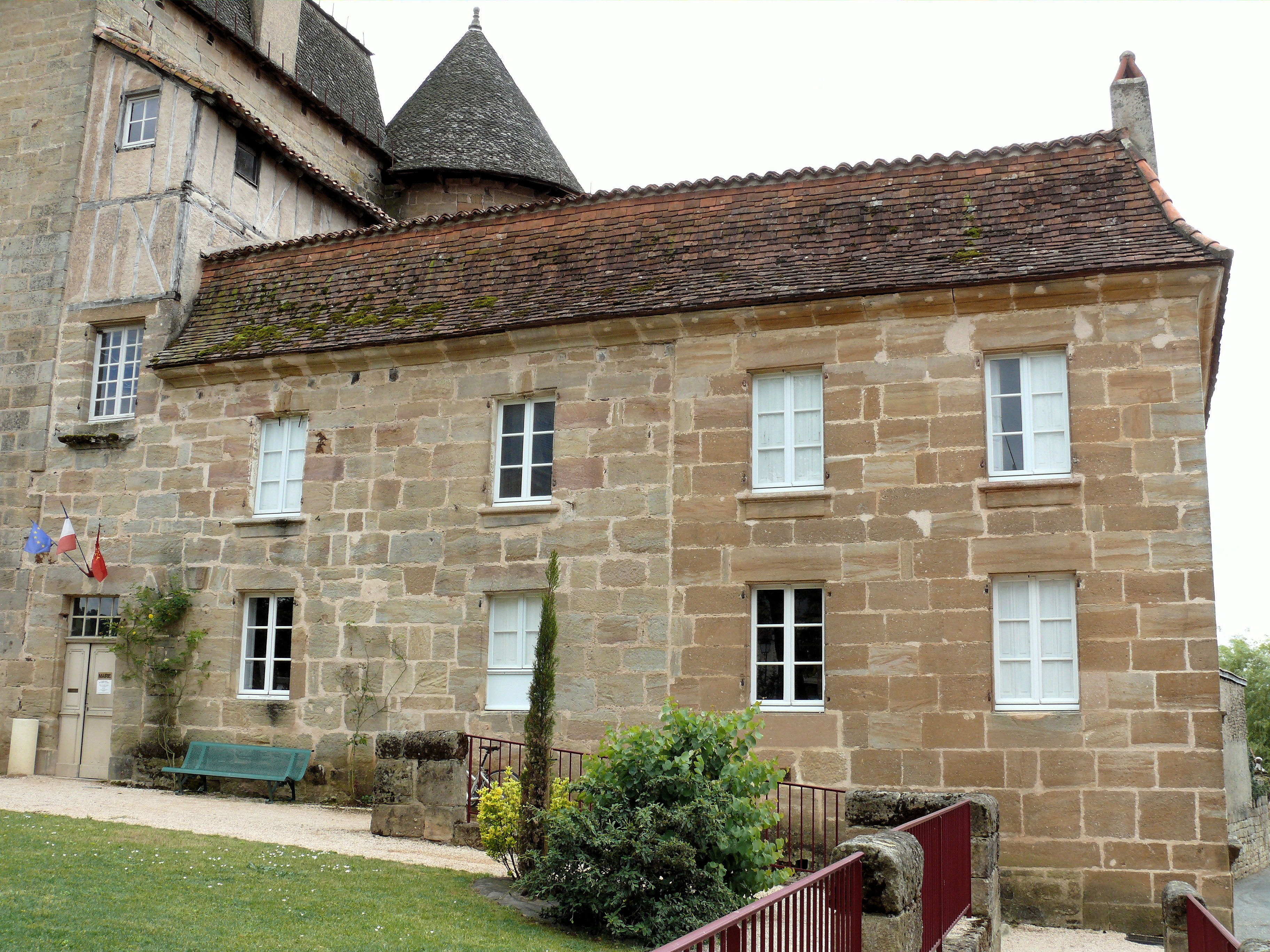 Lacapelle-Marival - Mairie près du château